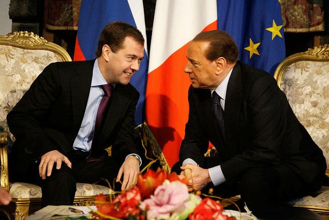 С Председателем Совета министров Италии Сильвио Берлускони.